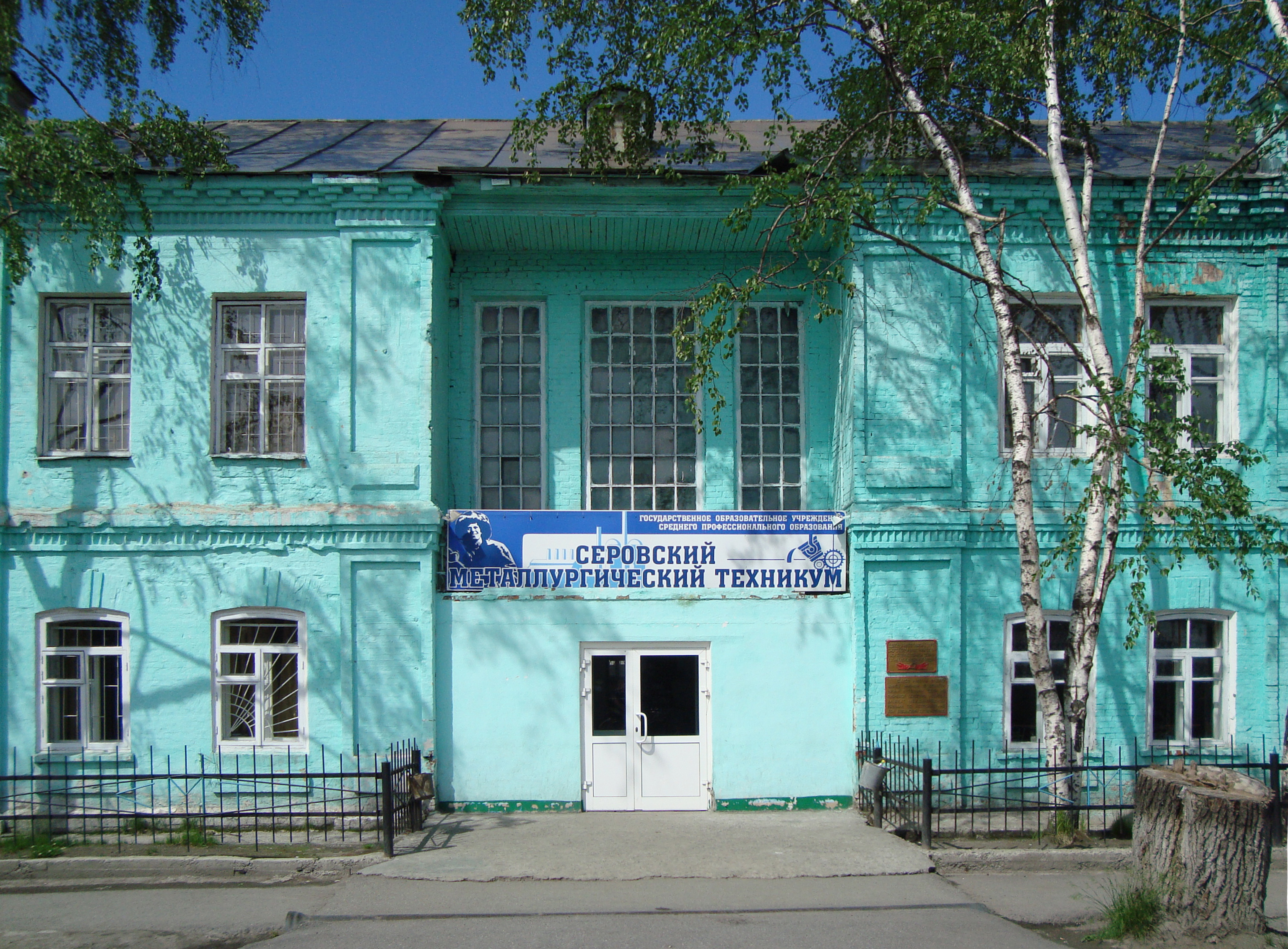 Фассад Серовского металлургического техникума